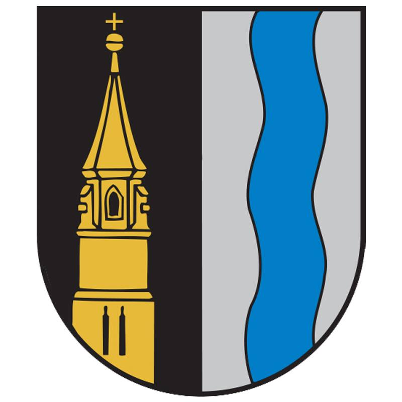 Das Wappen der Gemeinde Mehrnbach.